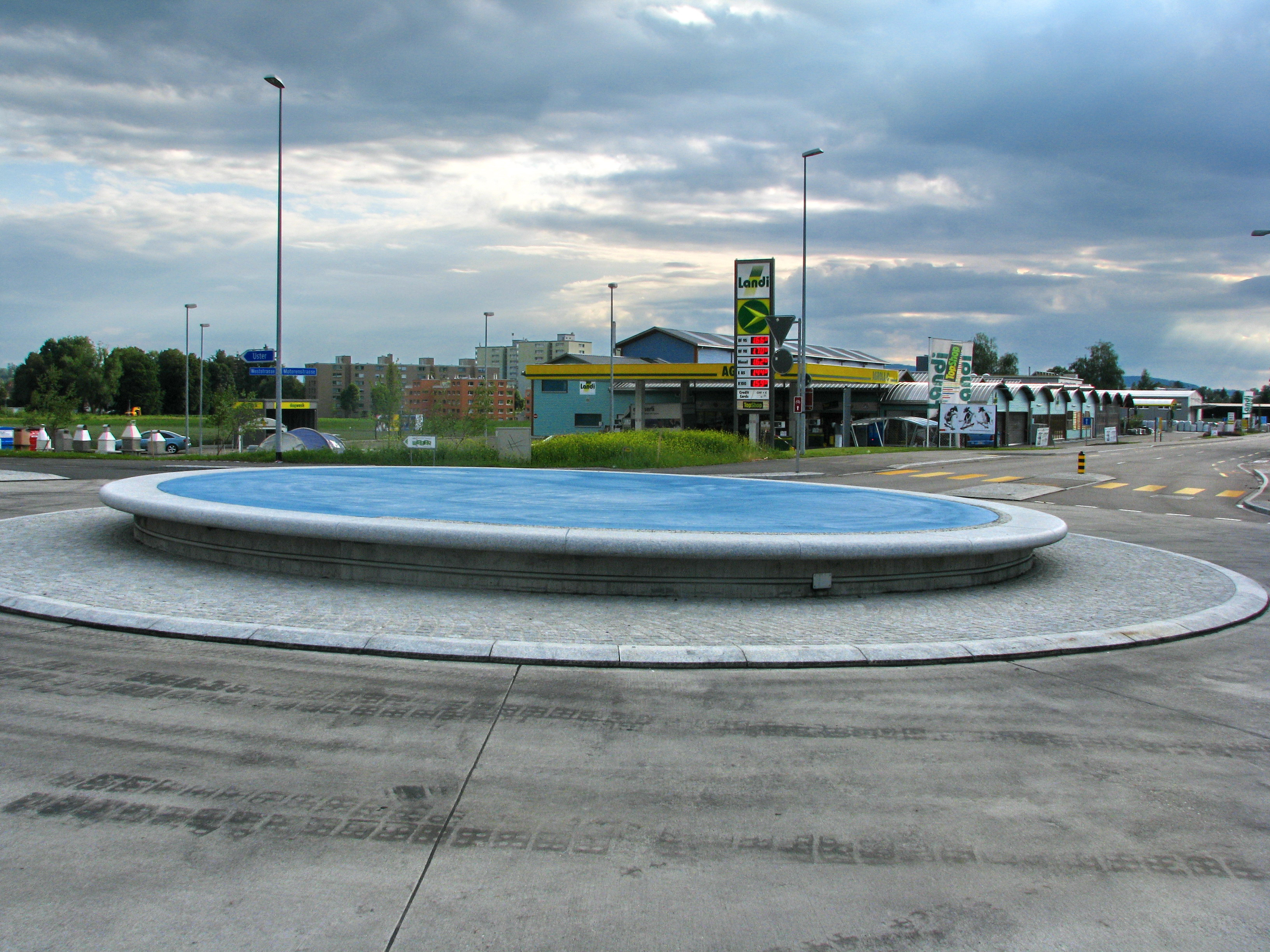 Wetzikon-Kempten (Switzerland)